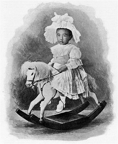 L'Illustration